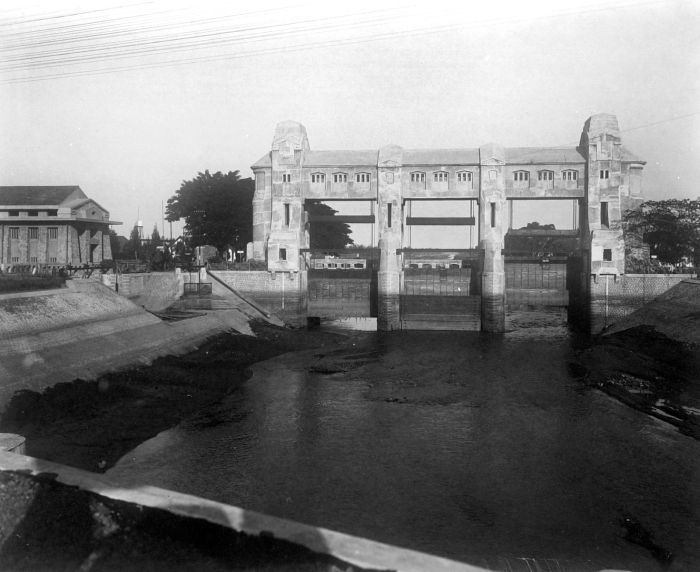 Repronegatief. Bovenstrooms aanzicht van de bandjirsluis Wonokromo tijdens de drooglegging van de Soerabaja-rivier, Java